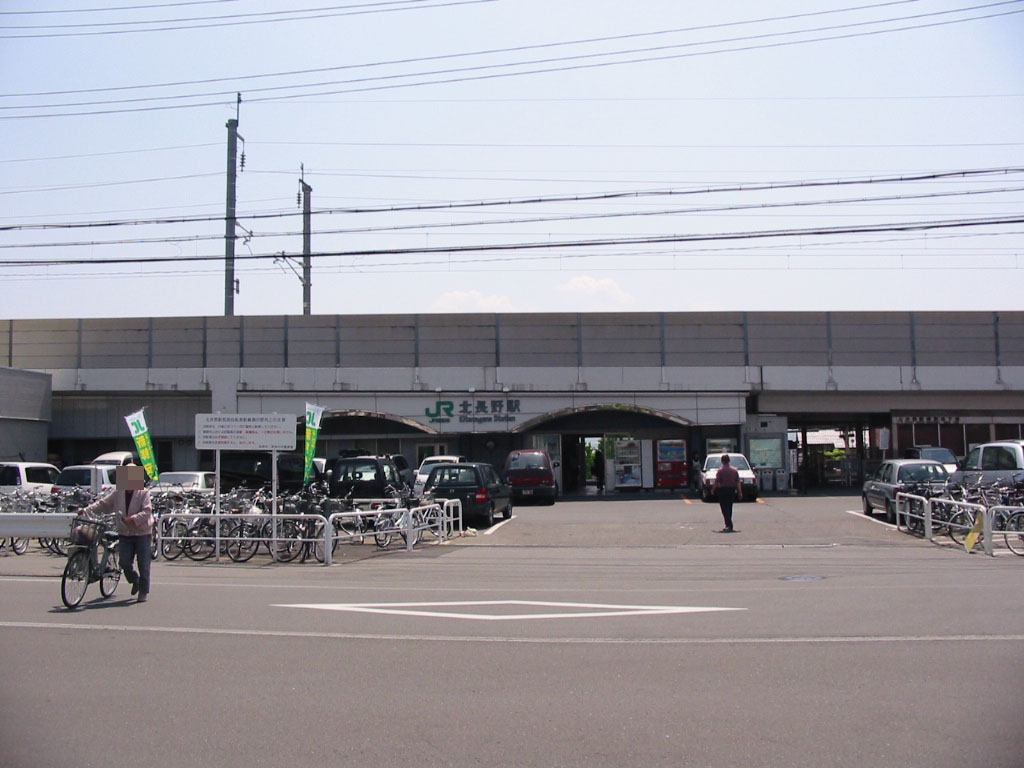 信越線北長野駅